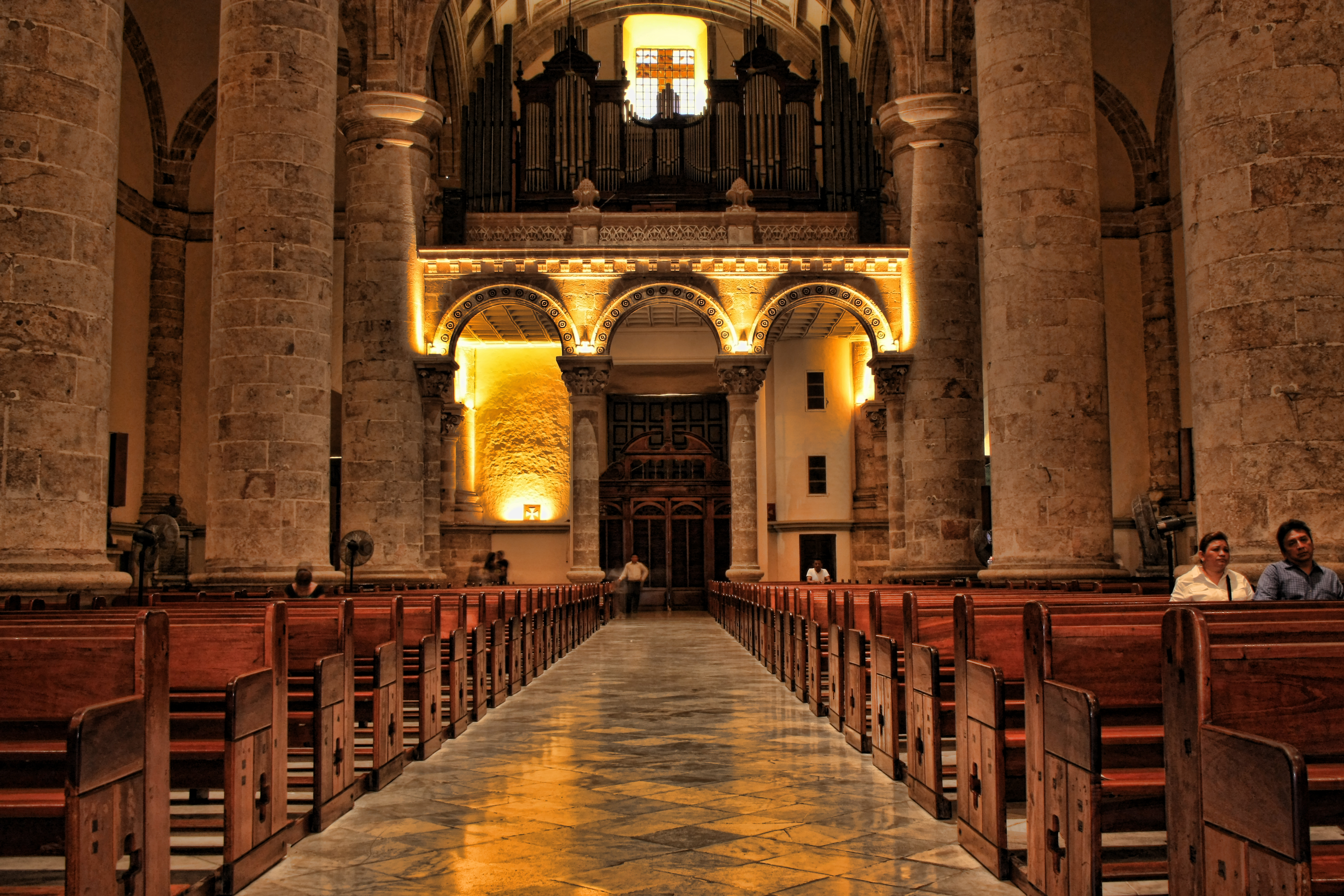 entrada principal de la catedral de San Ildefonso en Mérida,Yucatán,México